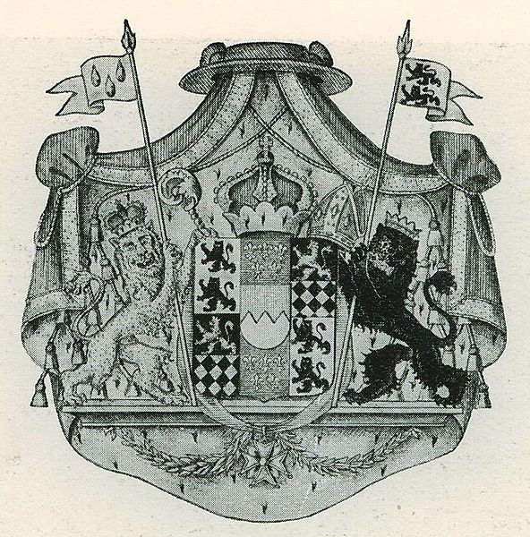 Wappen des Breslauer Bischofs Joseph Christian Franz zu Hohenlohe-Waldenburg-Bartenstein